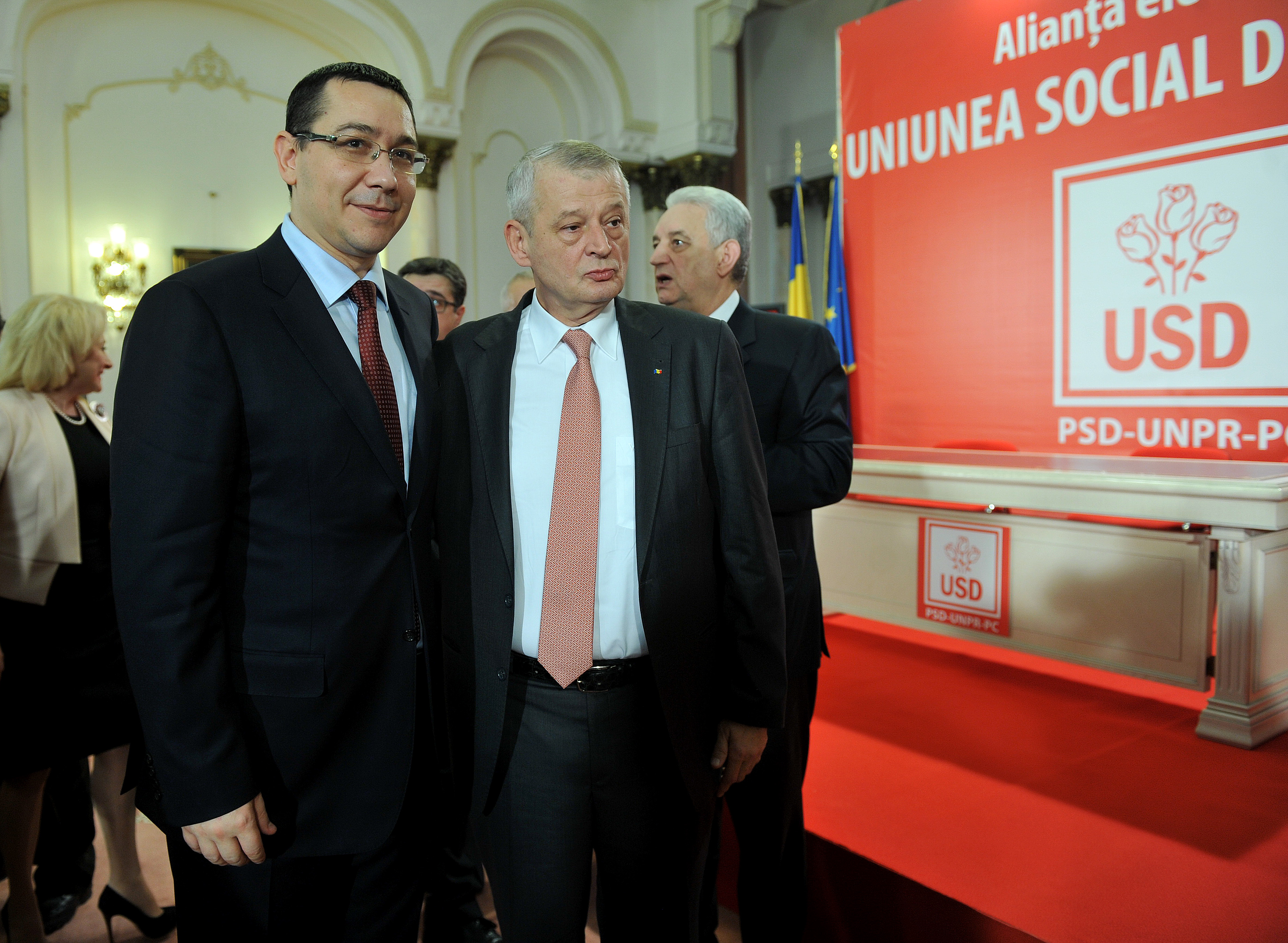 Victor Ponta si Sorin Oprescu la semnarea protocolului de infiintare a USD - 10.02.2014